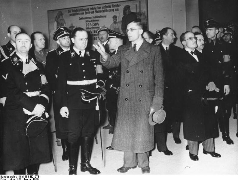 Auf der Grünen Woche 1939 Reichsminister Darré (Mitte), Polizeipräsident Graf Helldorf und Reichsführer SS Himmler beim Rundgang durch die gewaltige Schau. Ganz rechts der französische Botschafter Coulondre. Fot.: 27.1.39 Abgebildete Personen: (V.l.n.r.) Himmler, Heinrich: Reichsführer der SS, Deutschland (GND 11855123X) Darré, Richard Walther: Leiter Rasse- und Siedlungshauptamt, Reichsbauernführer, Deutschland (GND 118671030) Helldorff, Wolf Heinrich von Graf: Polizeipräsident von Berlin, Ritterkreuz (RK), Prozeß 20. Juli 1944, Deutschland (GND 119528789) Coulondre, Robert: Botschafter in Deutschland und der Sowjetunion, Frankreich (GND 124375065)